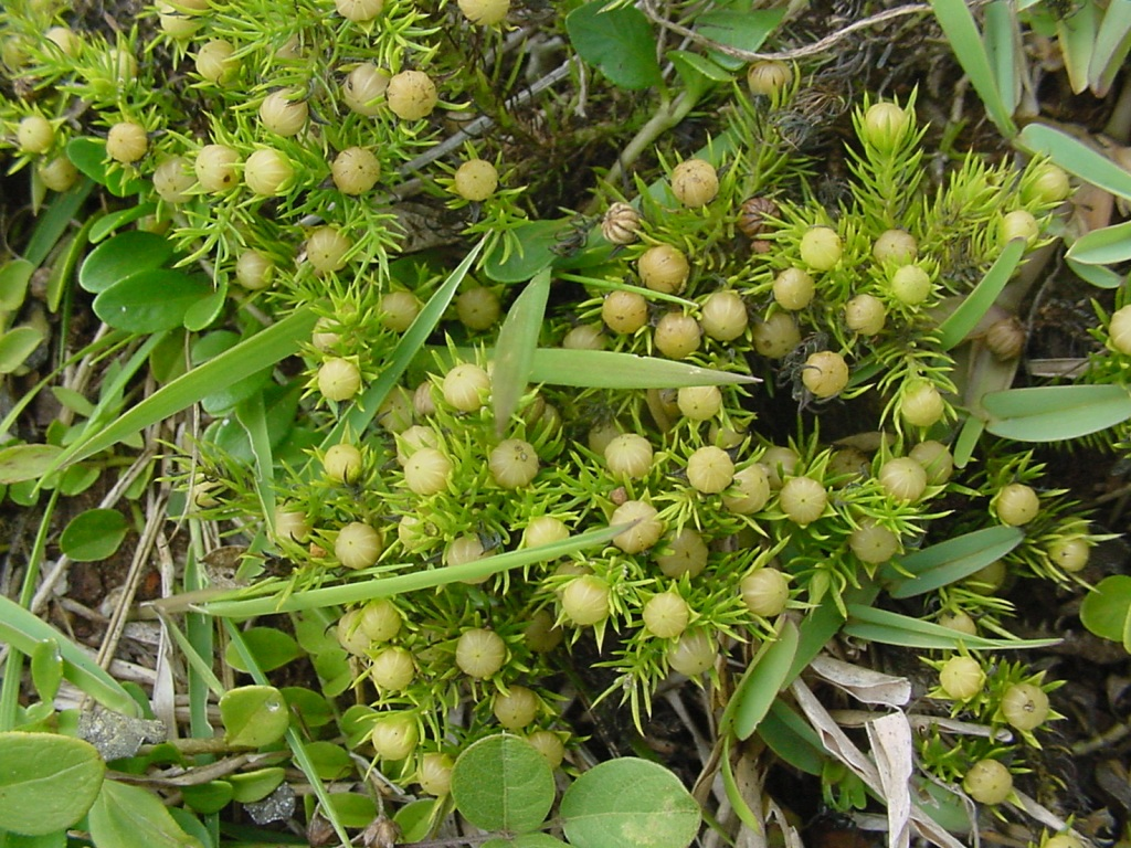 Cliococca selaginoides - LINACEAE - Torres - RS - Brasil